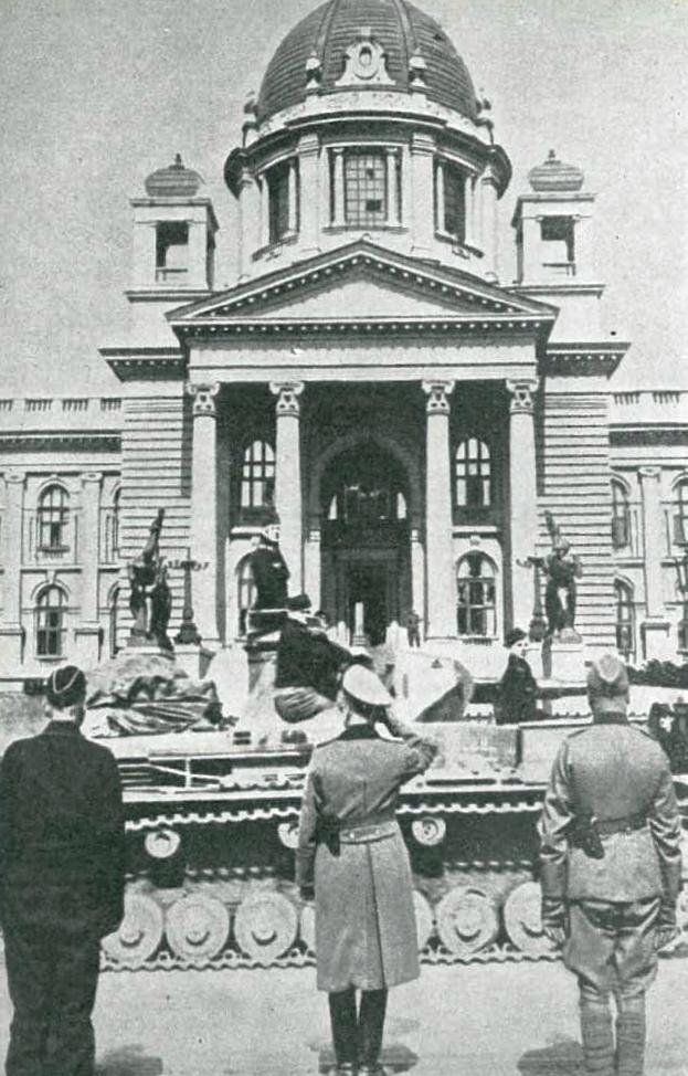 Parada nemške vojske v okupiranem Beogradu 14. aprila 1941. Spredaj v sredini nemški generalpolkovnik von Kleist, v ozadju poslopje skupščine